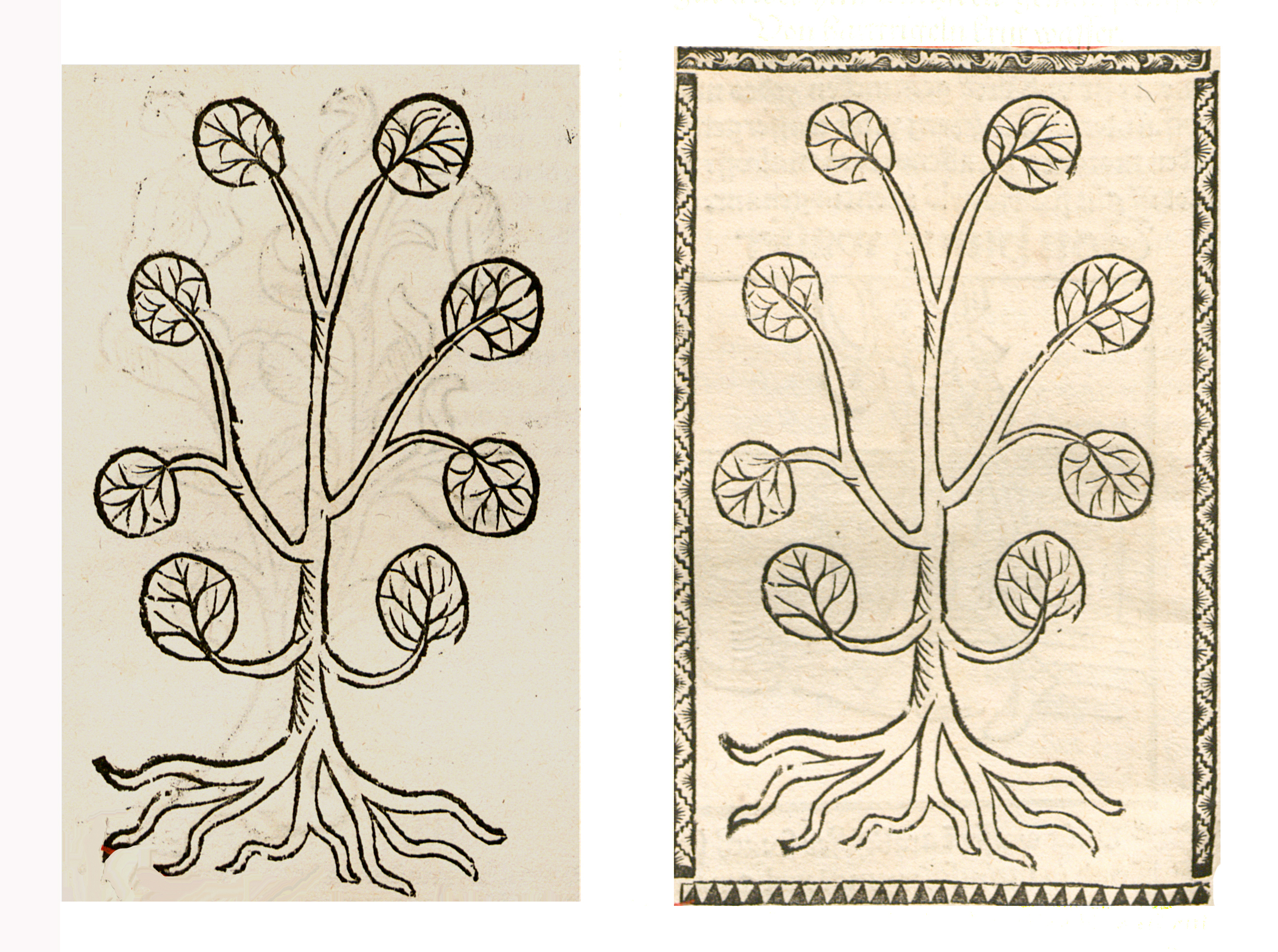 Abbildung zum Kapitel "Hart Trigeln" (Cornus sanguinea)